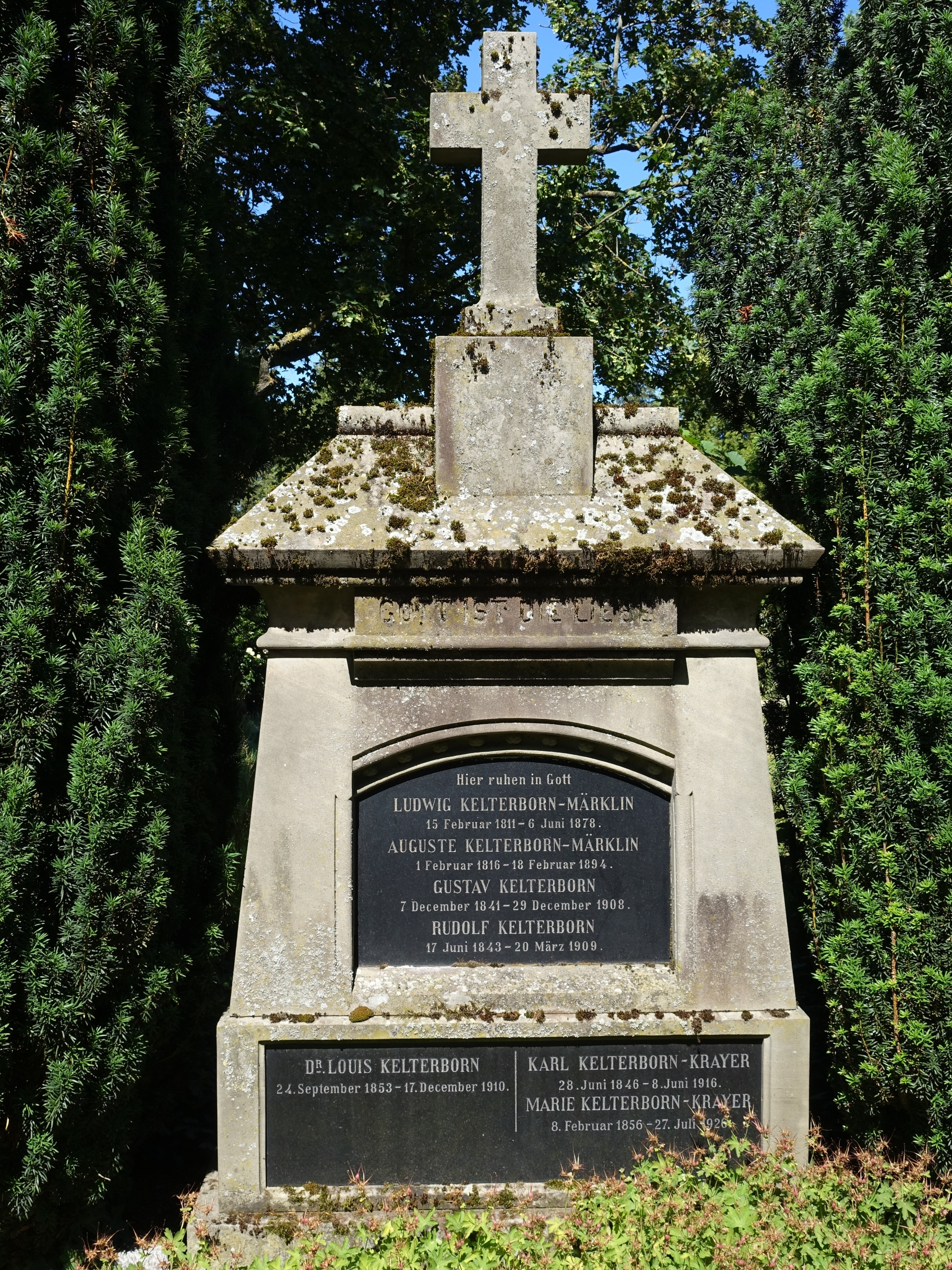 Ludwig Adam Kelterborn (1811–1878) Genremaler und Karikaturist. Familien Grab auf dem Friedhof Wolfgottesacker, Basel